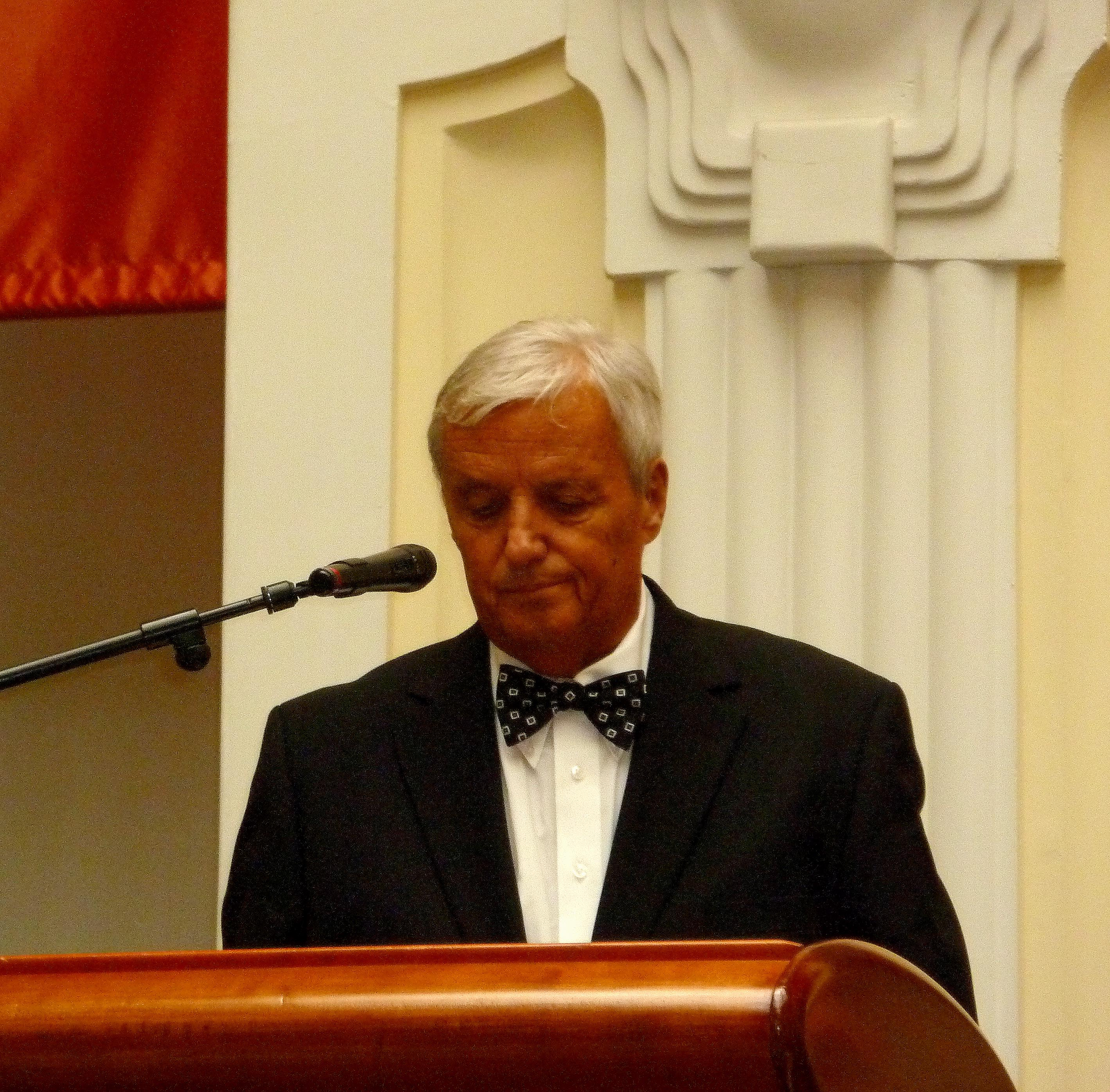 Novák István építészmérnök beszédet mond a Budapesti Műszaki Egyetem Építészmérnöki Karának aranydiploma-osztóján